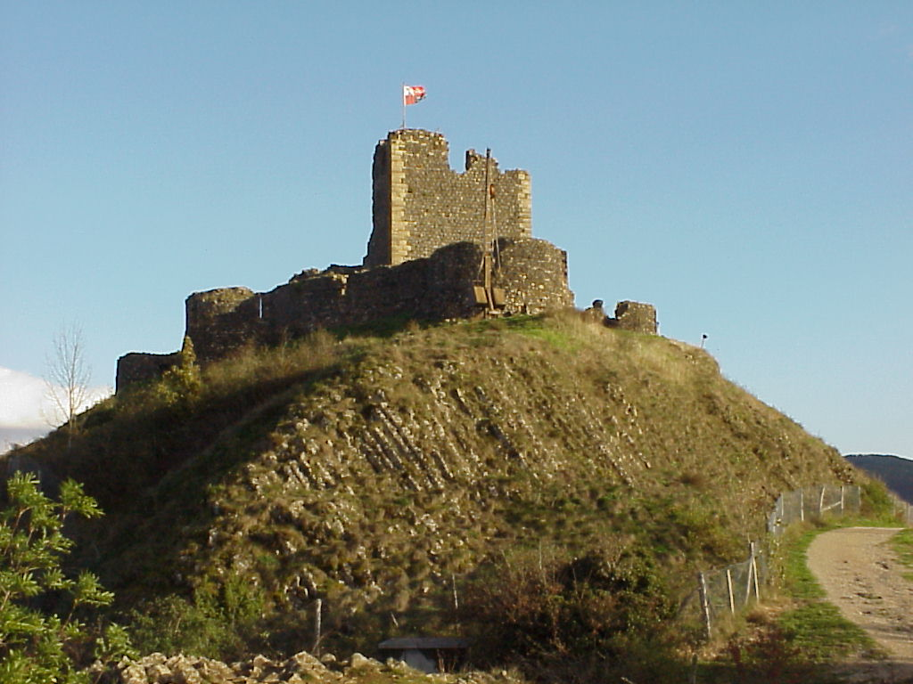 Titre: photo du château de Calmont d'Olt Source: Photo prise par Tierry Plume de Saint Côme d'Olt (avec autorisation) Licences: CC